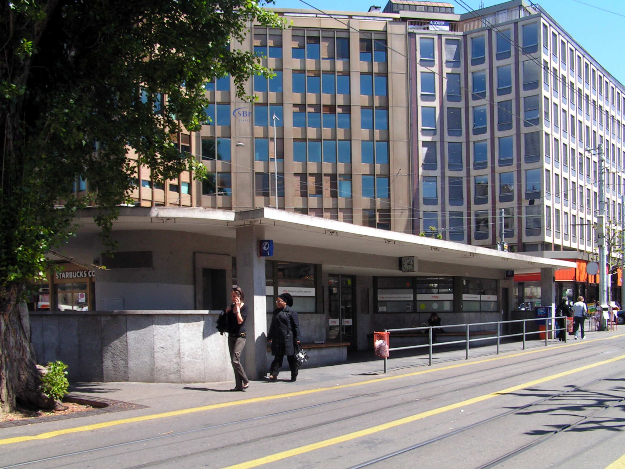 Kiosque de de la CGTE au rond-point de Rive, Genève